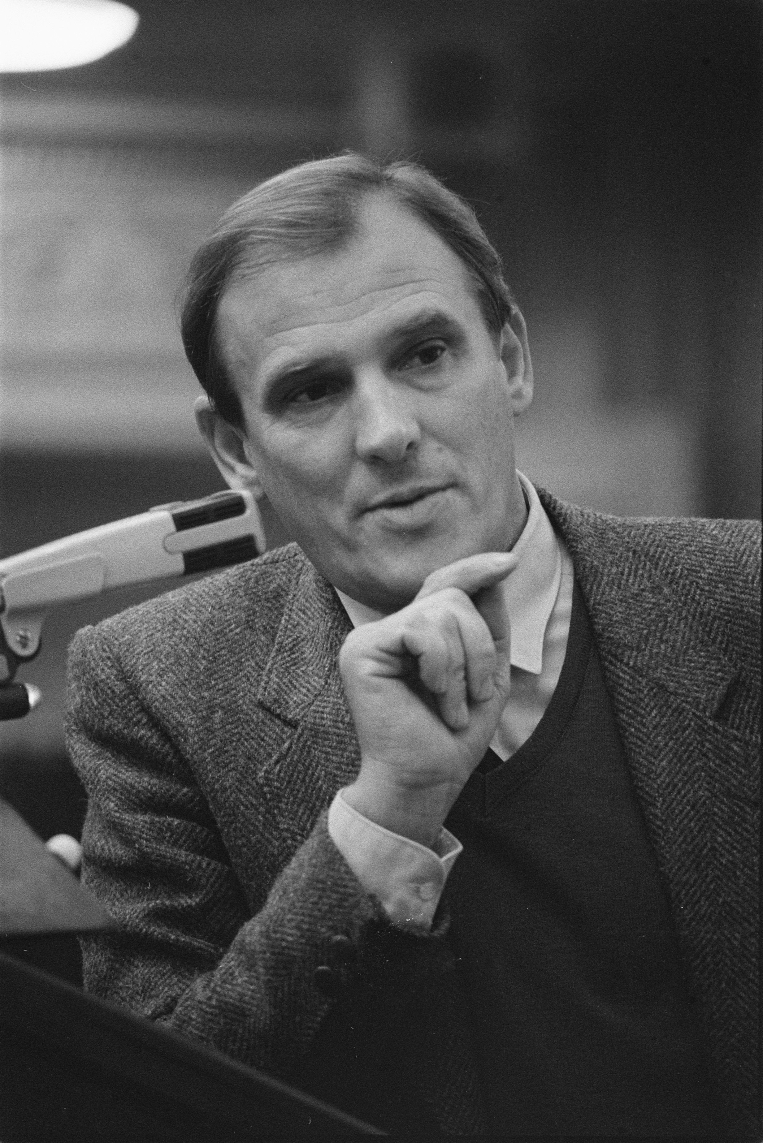 Collectie / Archief : Fotocollectie Anefo Reportage / Serie : Debat over mislukken overleg ambtenaren (korting 3,5%); Beschrijving : Albert-Jan Evenhuis (VVD) aan het woord Datum : 3 november 1983 Locatie : Den Haag, Zuid-Holland Trefwoorden : ambtenaren, loon- en prijsbeleid, parlementaire debatten, parlementariërs Persoonsnaam : Evenhuis, A.J. Instellingsnaam : Tweede Kamer Fotograaf : [onbekend] Auteursrechthebbende : Nationaal Archief Materiaalsoort : Negatief (zwart/wit) Nummer archiefinventaris : bekijk toegang 2.24.01.05 Bestanddeelnummer : 932-7588